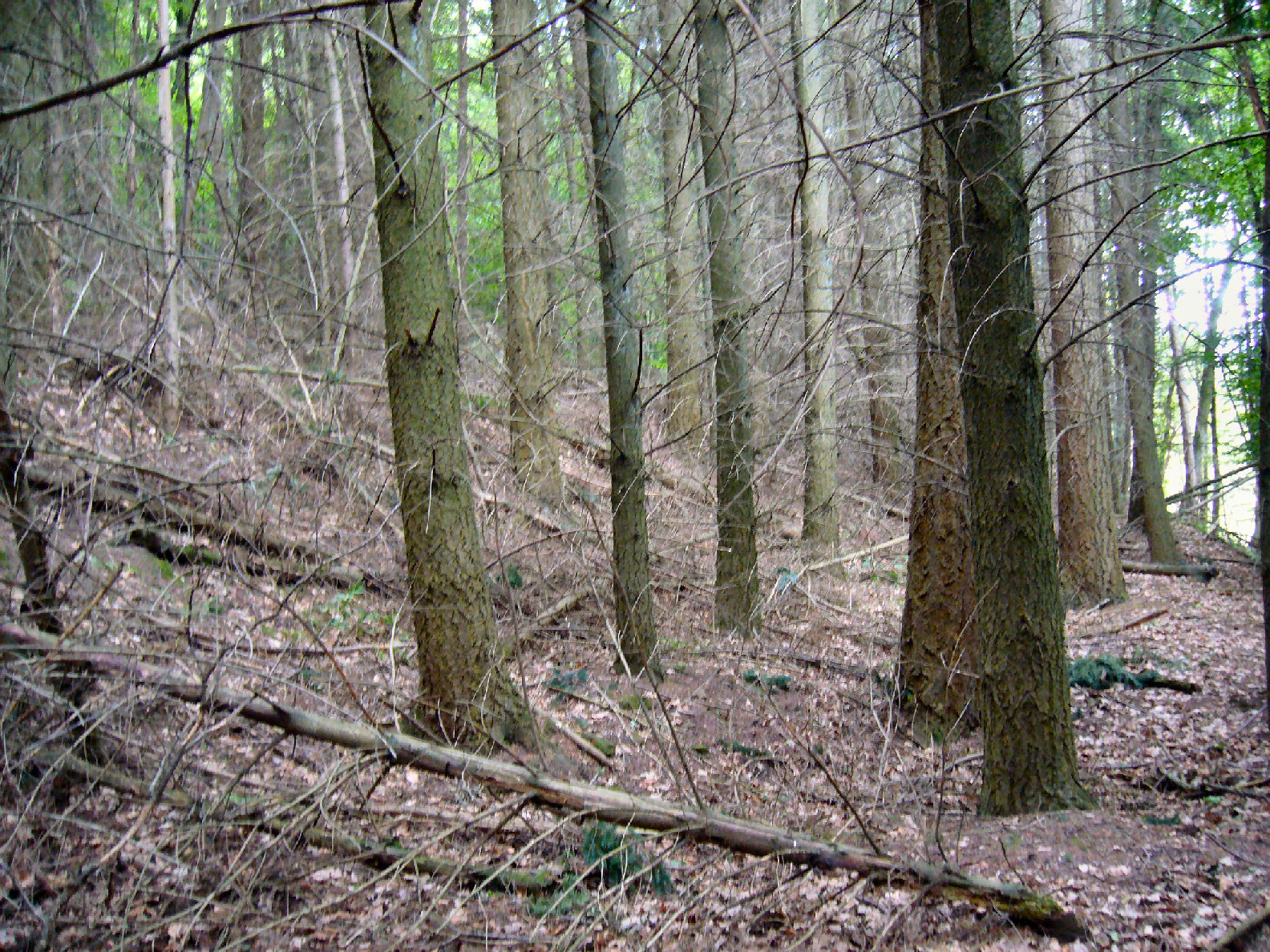 Forêt de douglas en Lorraine, France.